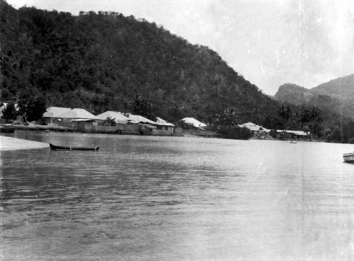 Repronegatief. De haven van Atapoepoe